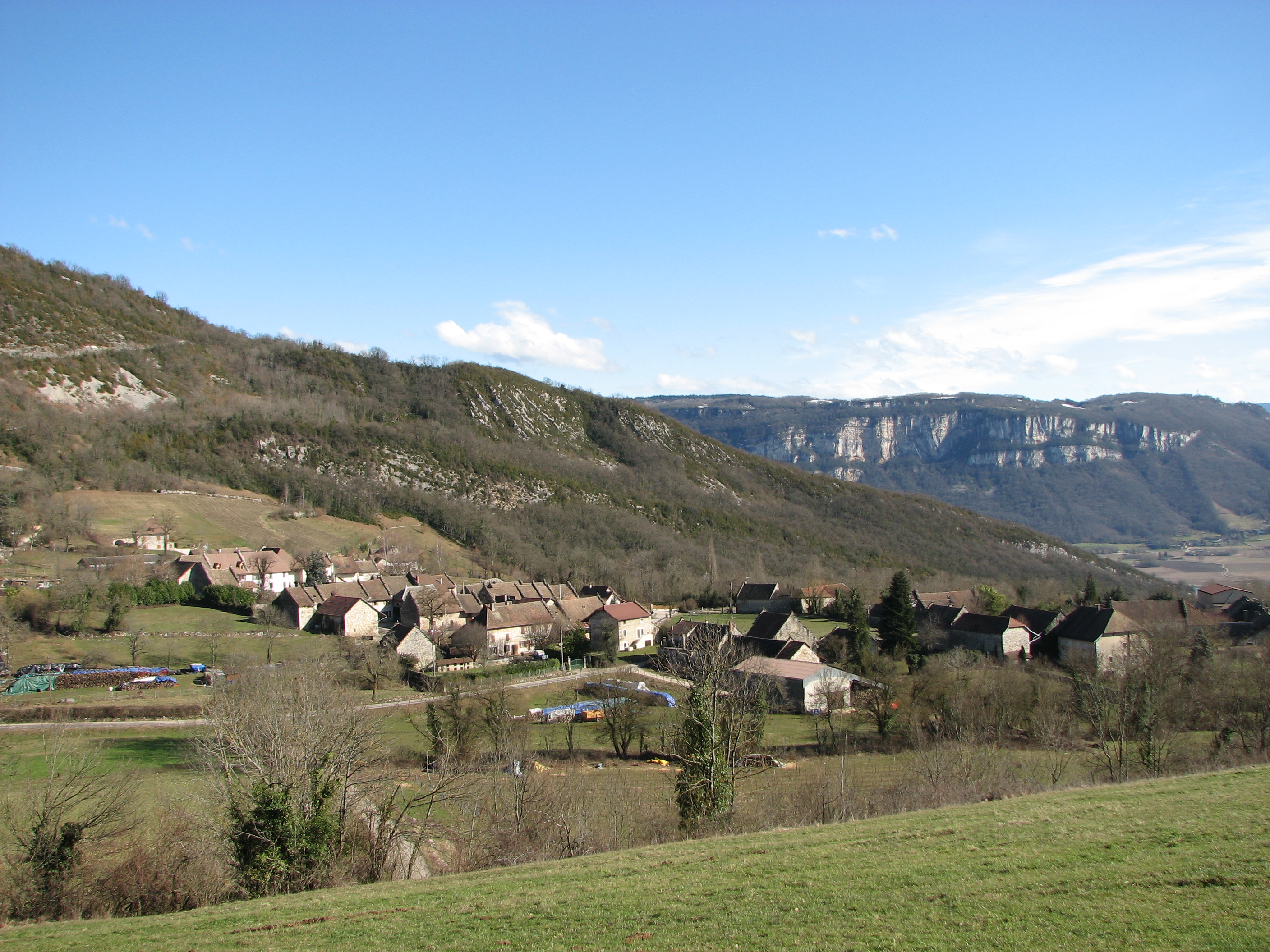 Le village d'Izieu